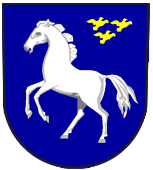 Znak obce Pozděchov